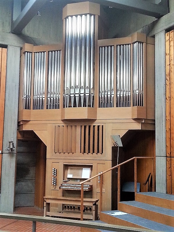 St. Georg (Taufkirchen)